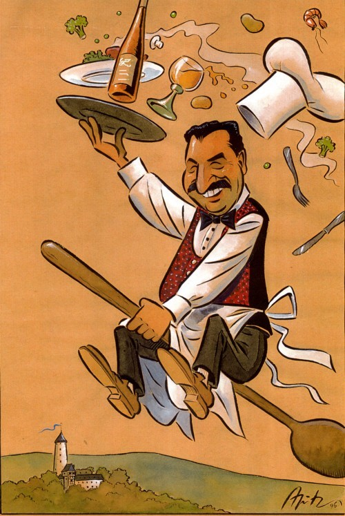 Karikatur Johann Lafers von Michael Apitz